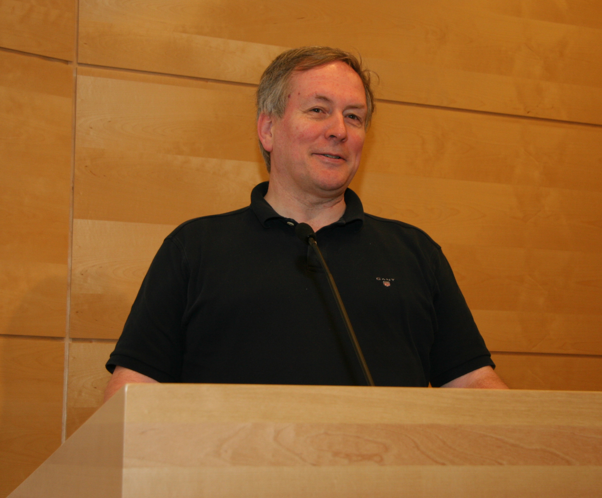 Styreleder for Wikimedia Norge, Hans Rosbach., Oslo 2007.